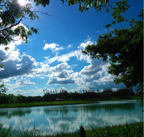 En el Pit 5 se puede disfrutar del bello paisaje que se conjugan con una laguna y los grandes arboles que hay alrededor